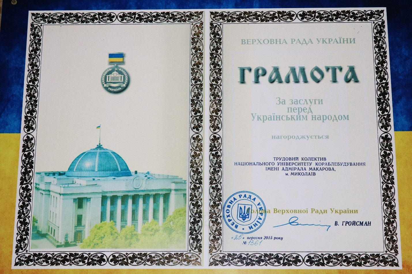 Грамота